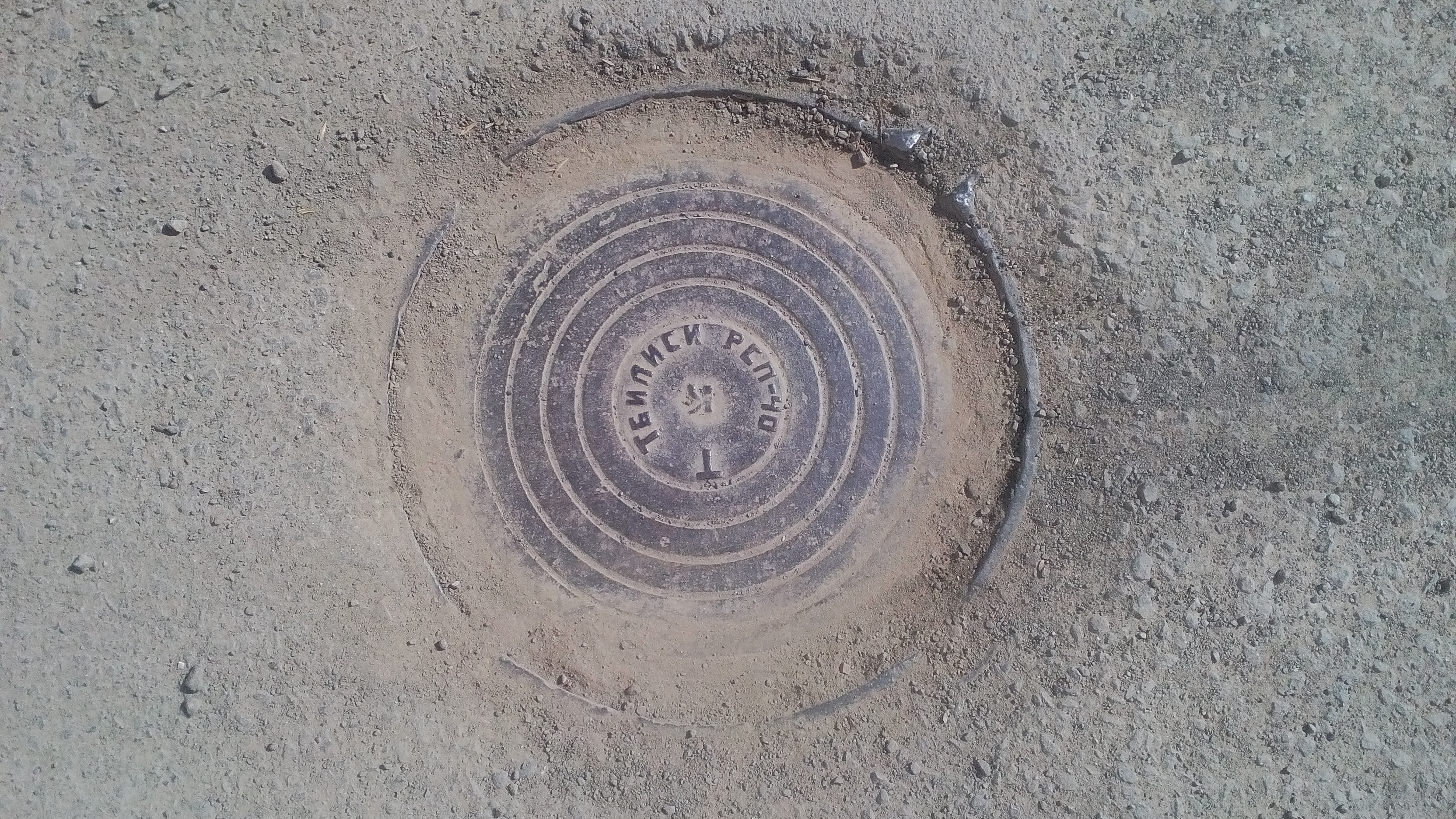 Канализационная крышка, город Каменск-Шахтинский.